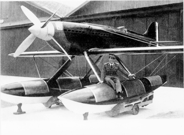 L'idrovolante Macchi MC 72